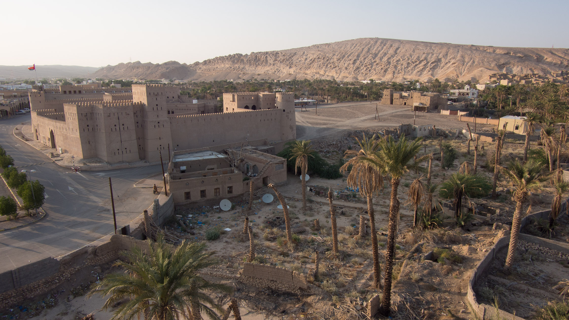 Blick auf das Fort Ibri und im Hintergrund die verlassenen Häuser der ursprünglichen Stadt.